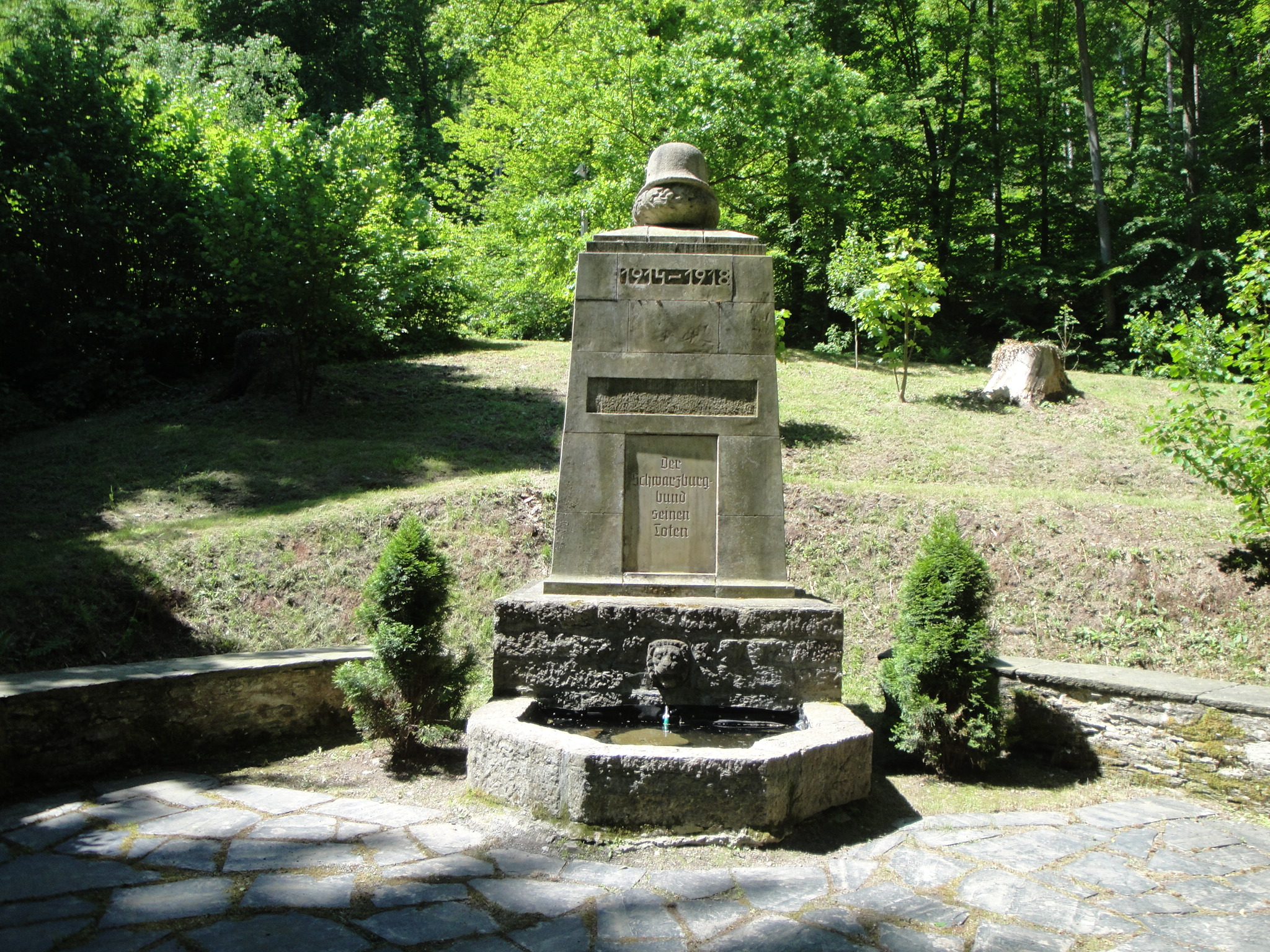 Blick auf den renovierten Ehrenhain des Schwarzburgbundes in Schwarzburg